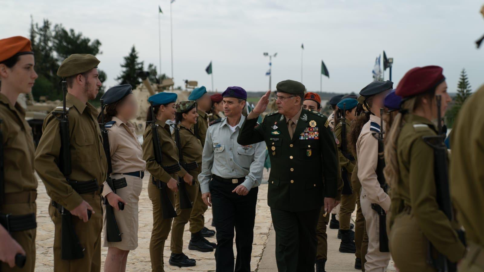 ביקור מפקד צבא היבשה של ברזיל בצה"ל, הגנרל אדסון ליאל פוג'ול, הוא התקבל במשמר כבוד בהשתתפות צוערי קורס קצינים בבה״ד 1, בניצוחו של רנ״ג בה״ד 1, רנ״ג יצחק טאיטו וקיים פגישה עם מפקד זרוע היבשה, האלוף יואל סטריק